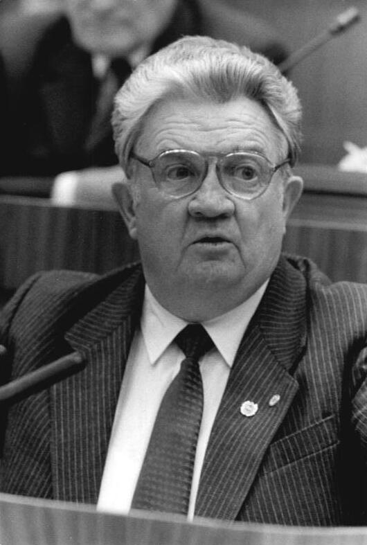 ADN-ZB/Mittelstädt 17.6.86-Berlin: Volkskammertagung In der Diskussion sprach für die Fraktion der VdgB der Abgeordnete Gottfried Drechsel.